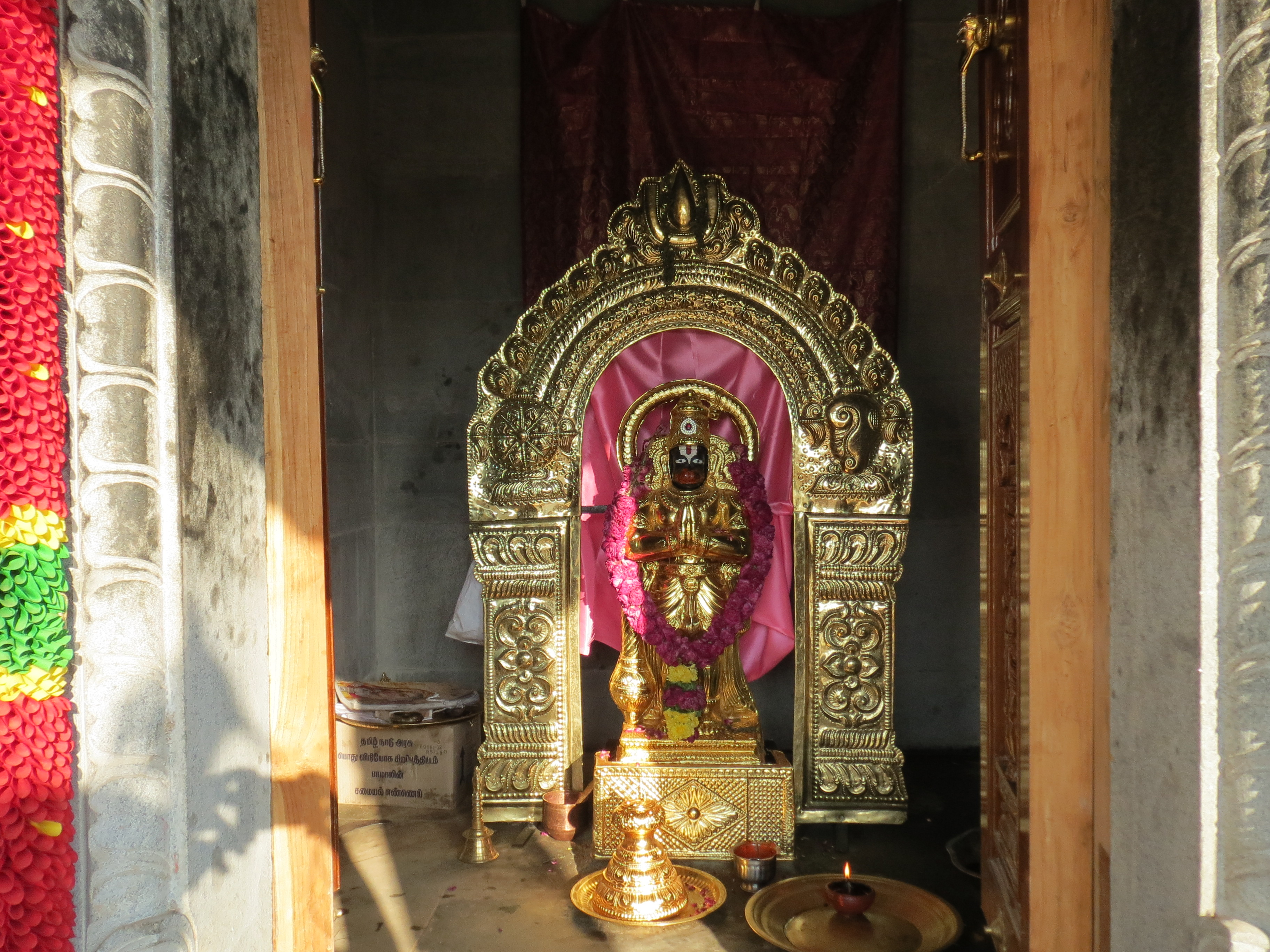 Aanjaneyar at venkatesaperumal temple, parameswaranpalayam (coimbatore)